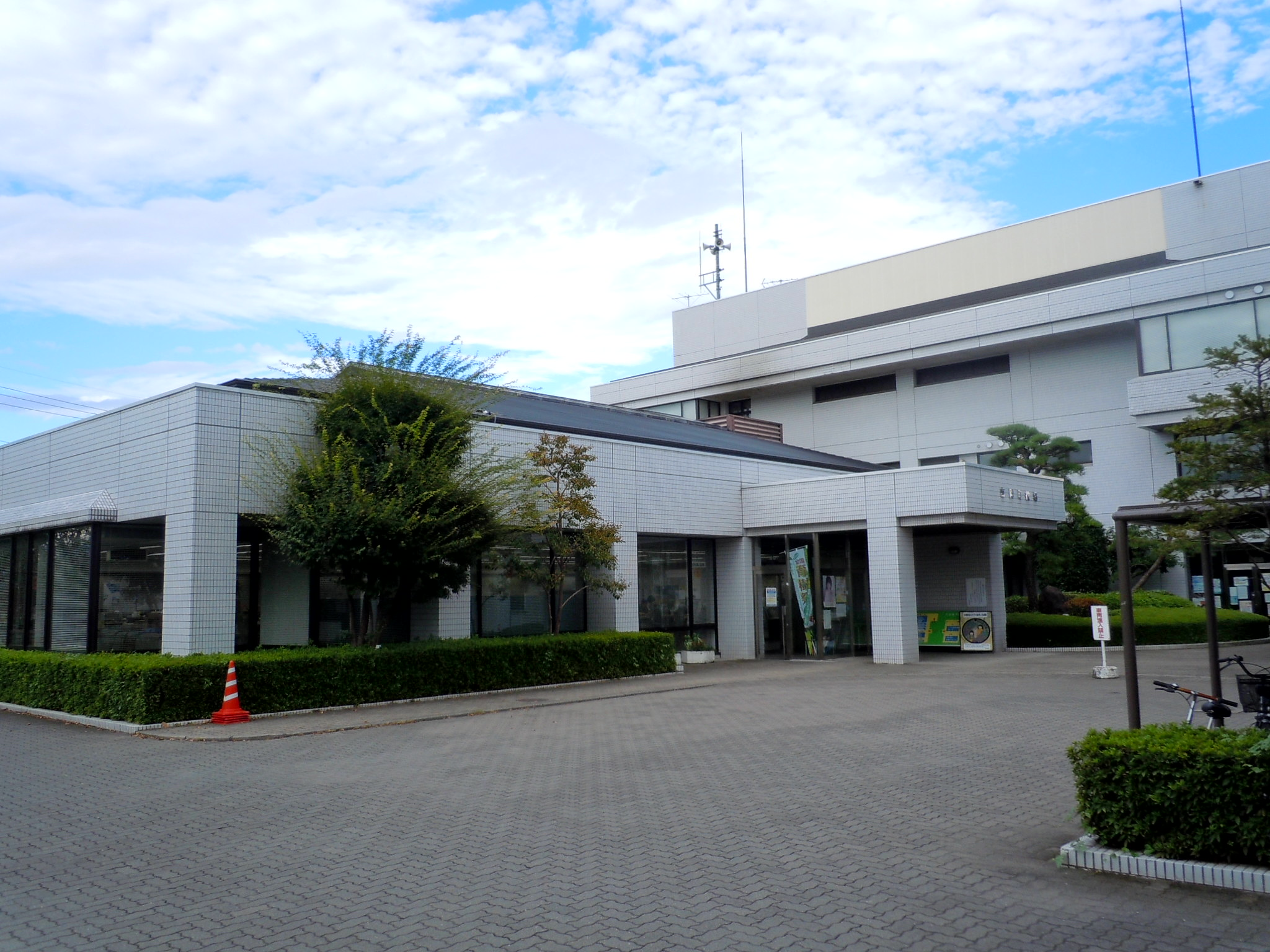 吉岡町役場